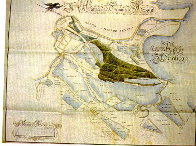 Je suis l'auteur de cette photo d'une carte datée de 1787 (archive municipales de Ferrare)